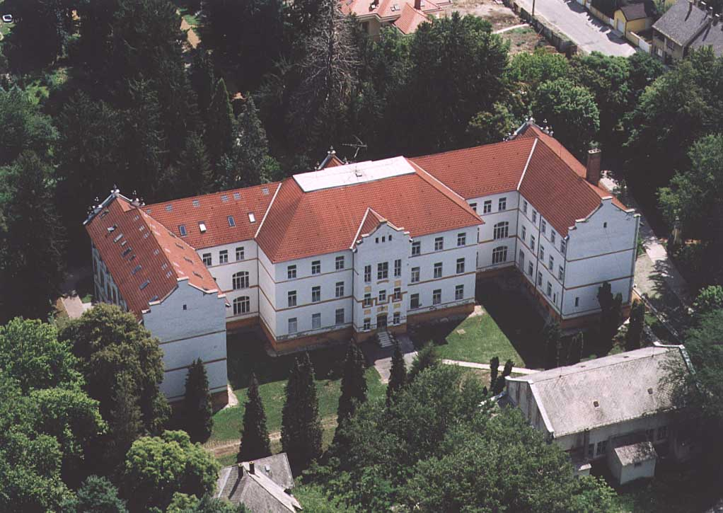 Csokonai Vitéz Mihály Református Gimnázium, Általános Iskola és Kollégium. - Cím: Csurgó, Széchenyi tér 9 This is a photo of a monument in Hungary. Identifier: 15416